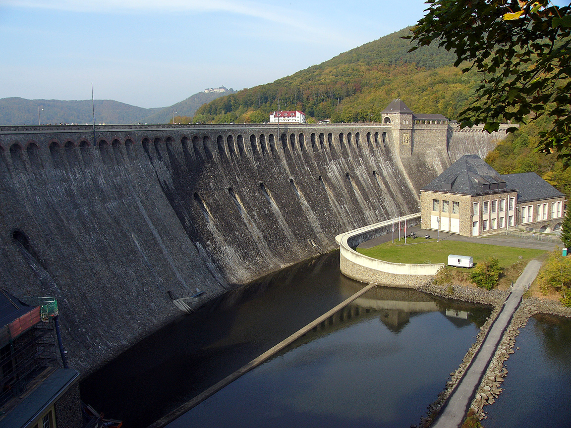 Edertalsperre